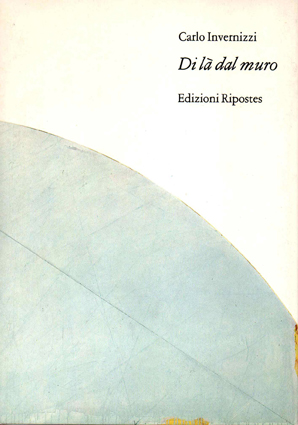 Invernizzi, Carlo, Di là dal muro, introduzione di Maria Vailati, Edizioni Ripostes, Salerno-Roma, 1984.